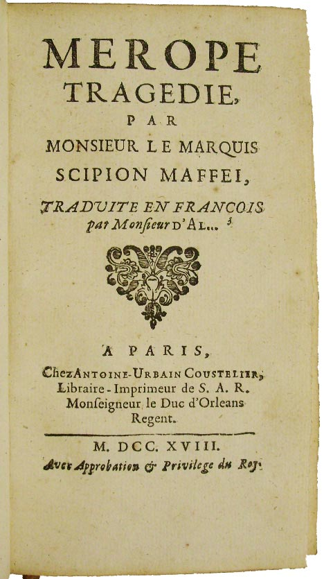 Edition originale de la traduction française de la Merope de Scipion Maffei Paris Coustelier 1718